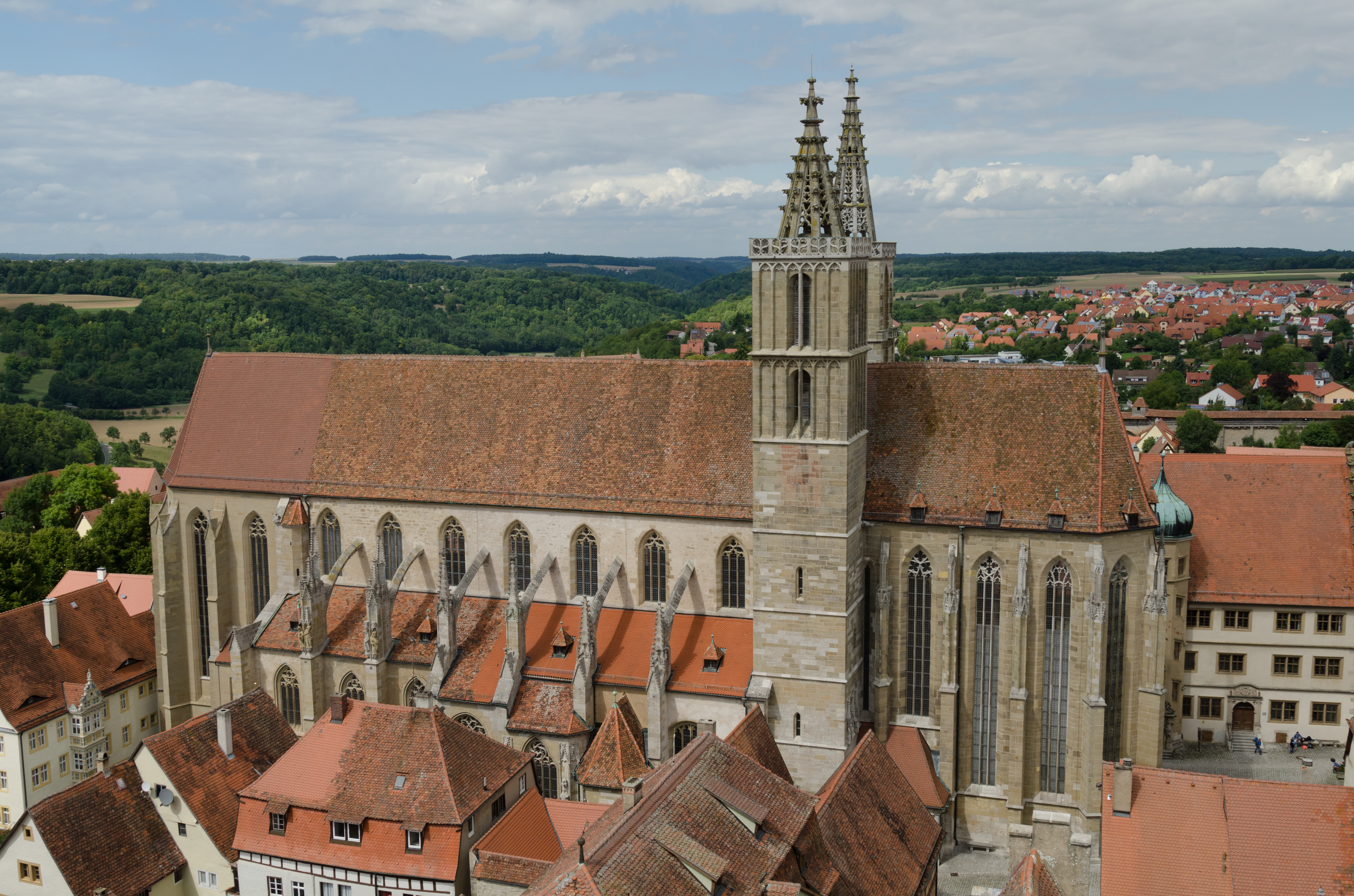 Rothenburg ob der Tauber, St. Jakob vom Rathausturm gesehen